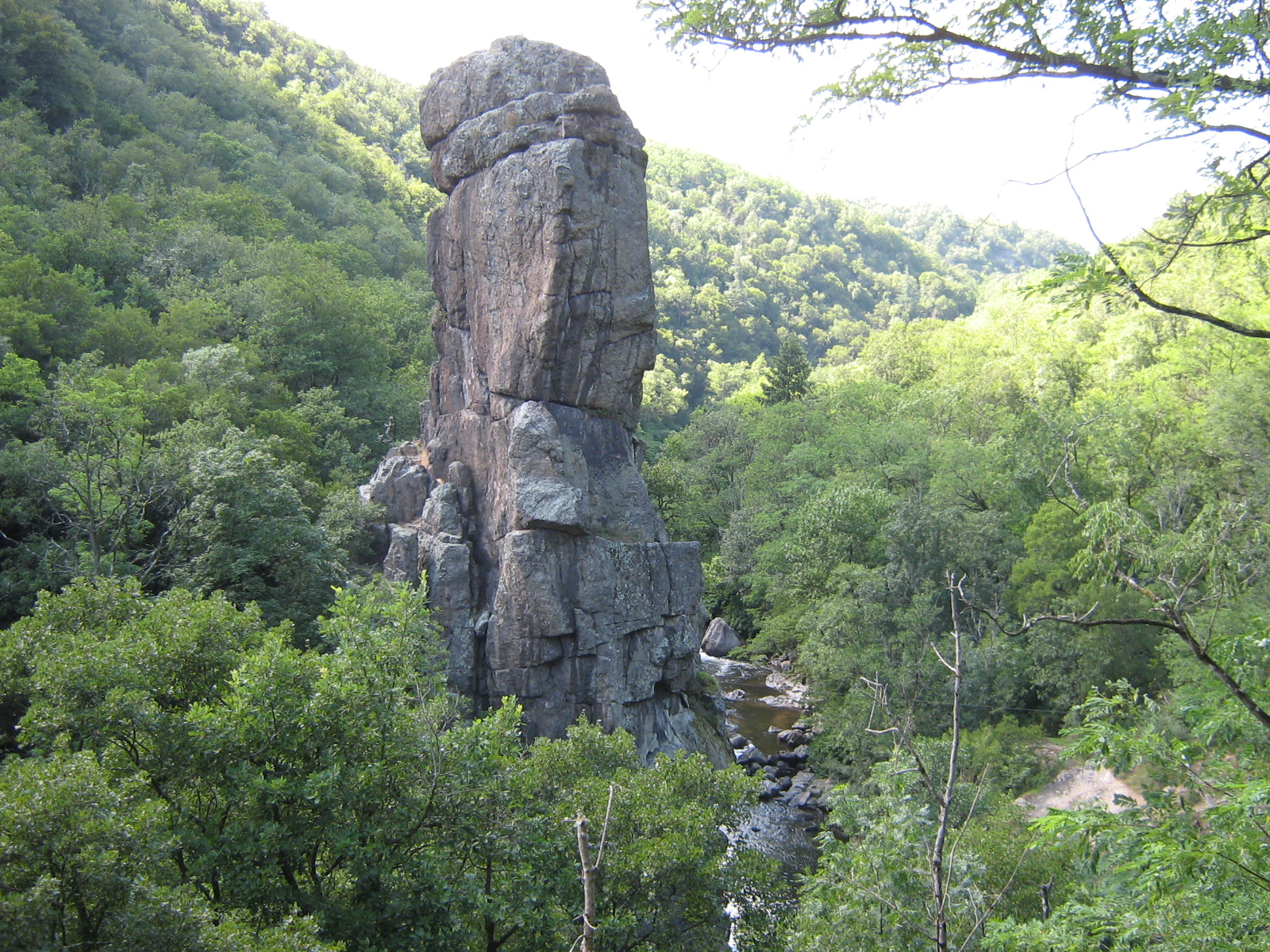 Sculpture naturelle (La Roche Péréandre, rocher monumental de 39m de haut) dans la vallée de la Cance.